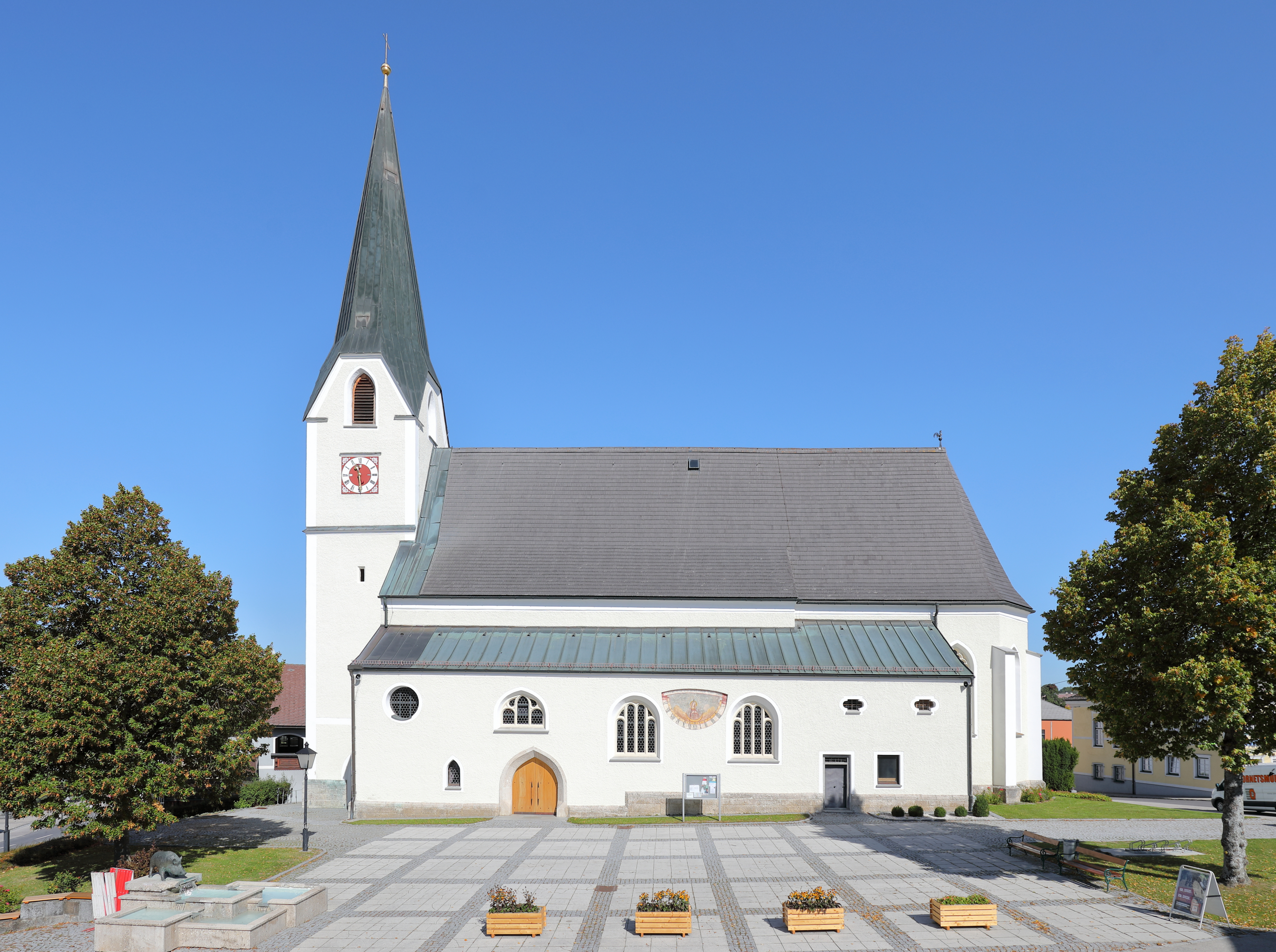 Südansicht der röm.-kath. Pfarrkirche hl. Michael in der oberösterreichischen Marktgemeinde Eberschwang.Die Kirche wurde ursprünglich im 11. Jahrhundert erbaut und Anfang des 15. Jahrhundert im gotischen Stil aus- und umgebaut. Die Seitenschiffe wurden jüngerem Datums angebaut.